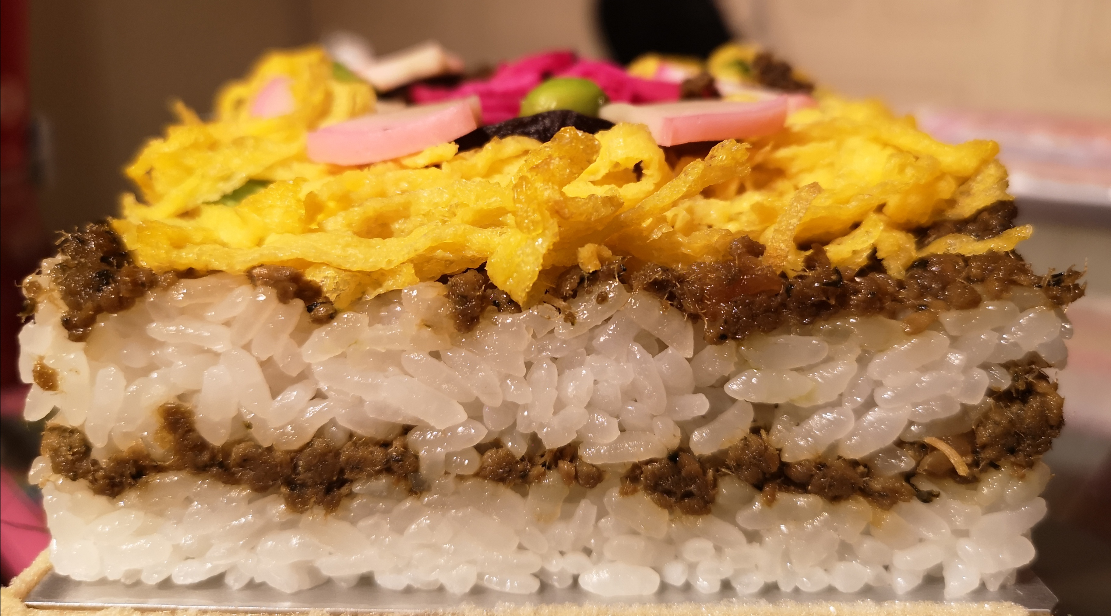 京都府北部・丹後地方の郷土料理「ばらずし」の２段の断面。